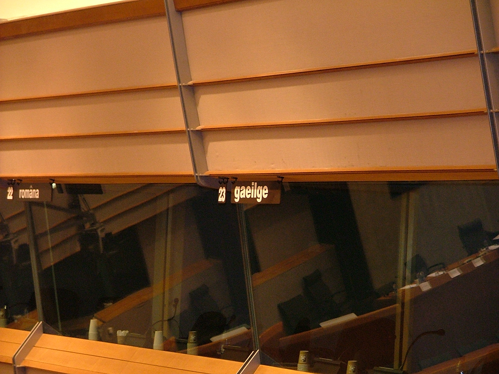 Belgium, Bruxelles - Brussel, European Parliament Pl: Belgia, Bruksela, Parlament Europejski